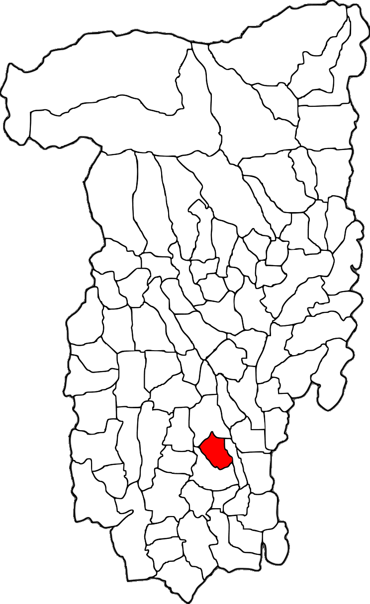 Lage der Gemeinde Amărăști im Kreis Vâlcea (RO).